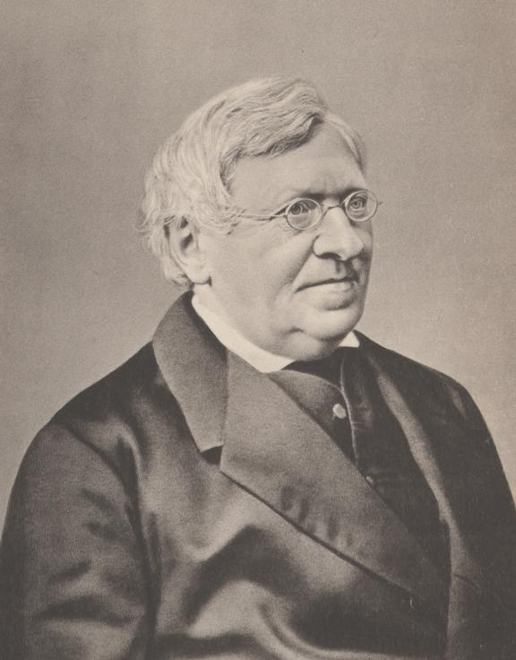 Johann Baptist Alzog (1808-1878) kath. Priester, Domkapitular, Professor für Kirchengeschichte